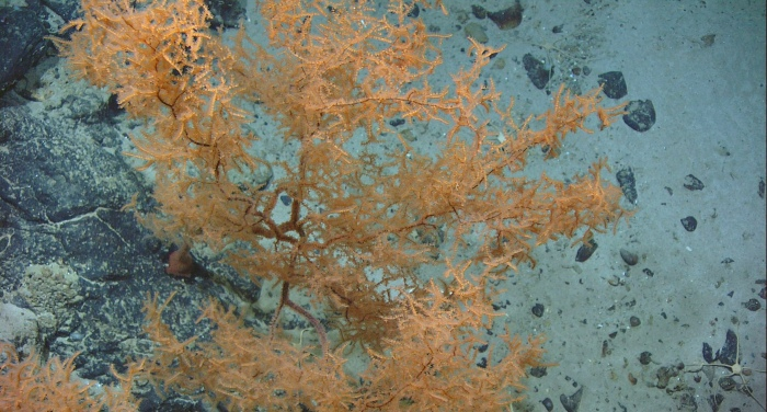 Leiopathes sp